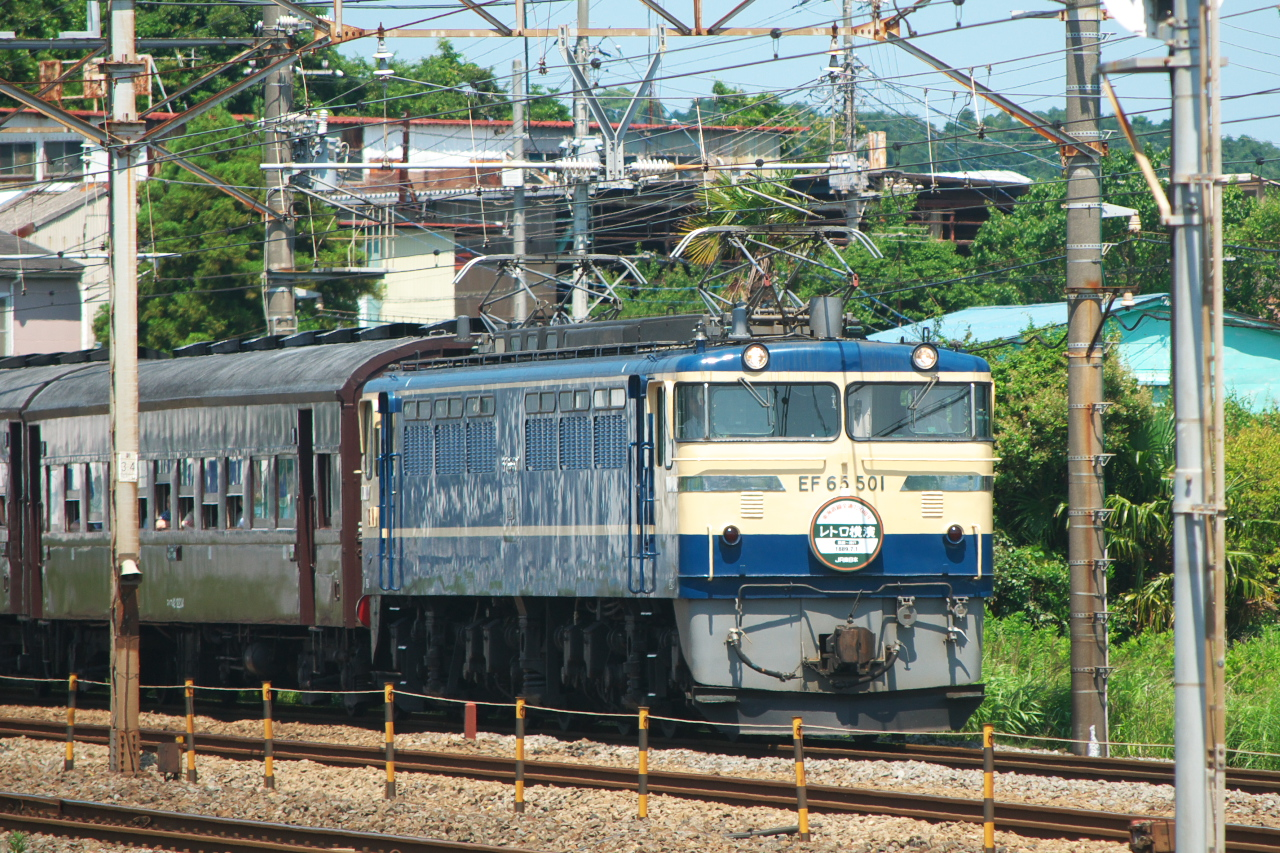 レトロ横濱3号です。自分が子供の頃はこのEF65 500番台がブルートレインの顔でした。 「レトロ横濱」なのに「新橋-神戸」とはどういうことか、という意見を見かけましたが、まあ、120周年記念ですからね。でも、レトロ横濱自体は「横浜・神奈川DC」の一環ですから、変と言えば変ですけど。 大船-藤沢にて。